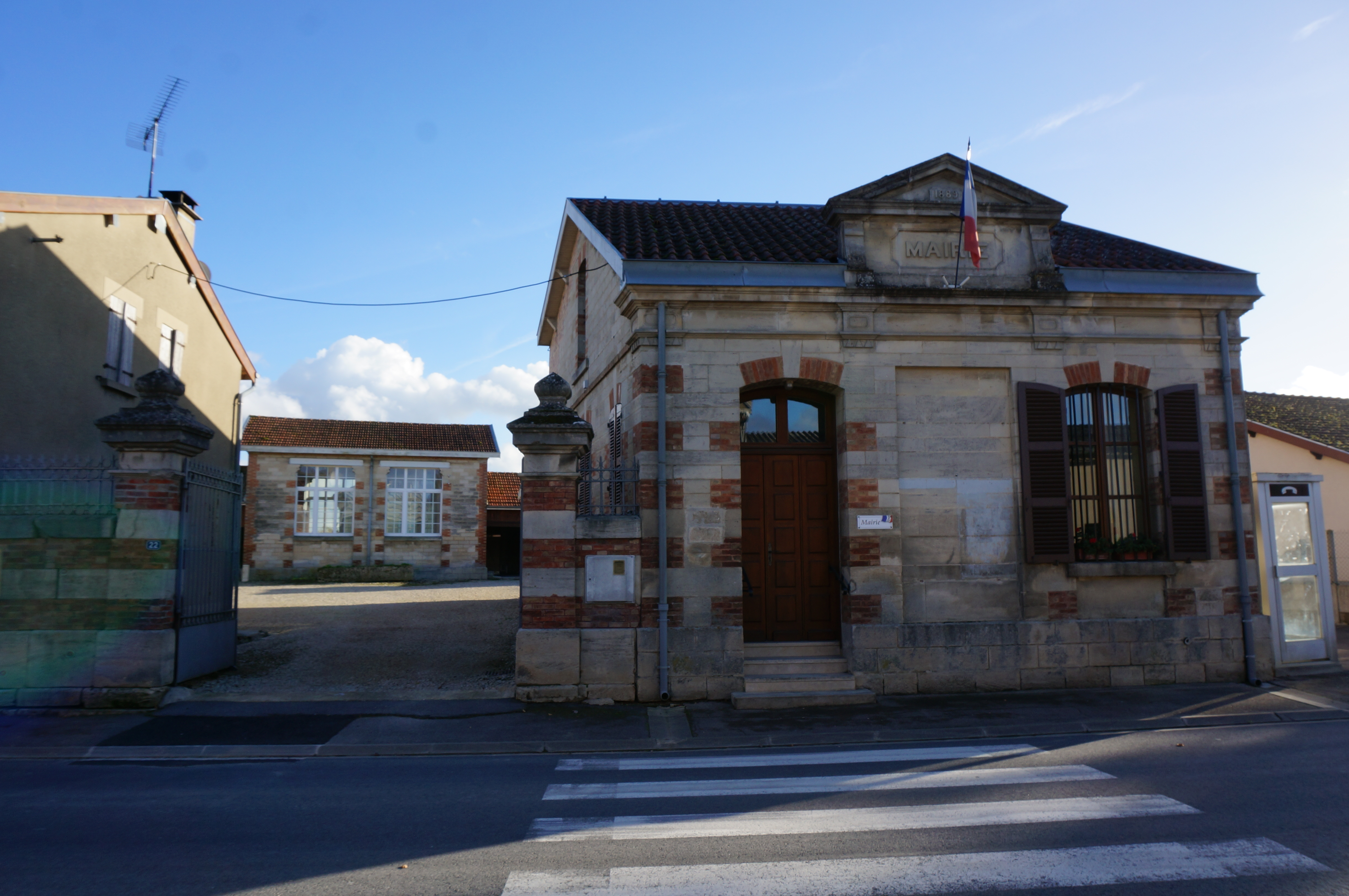 Vue de Songy.